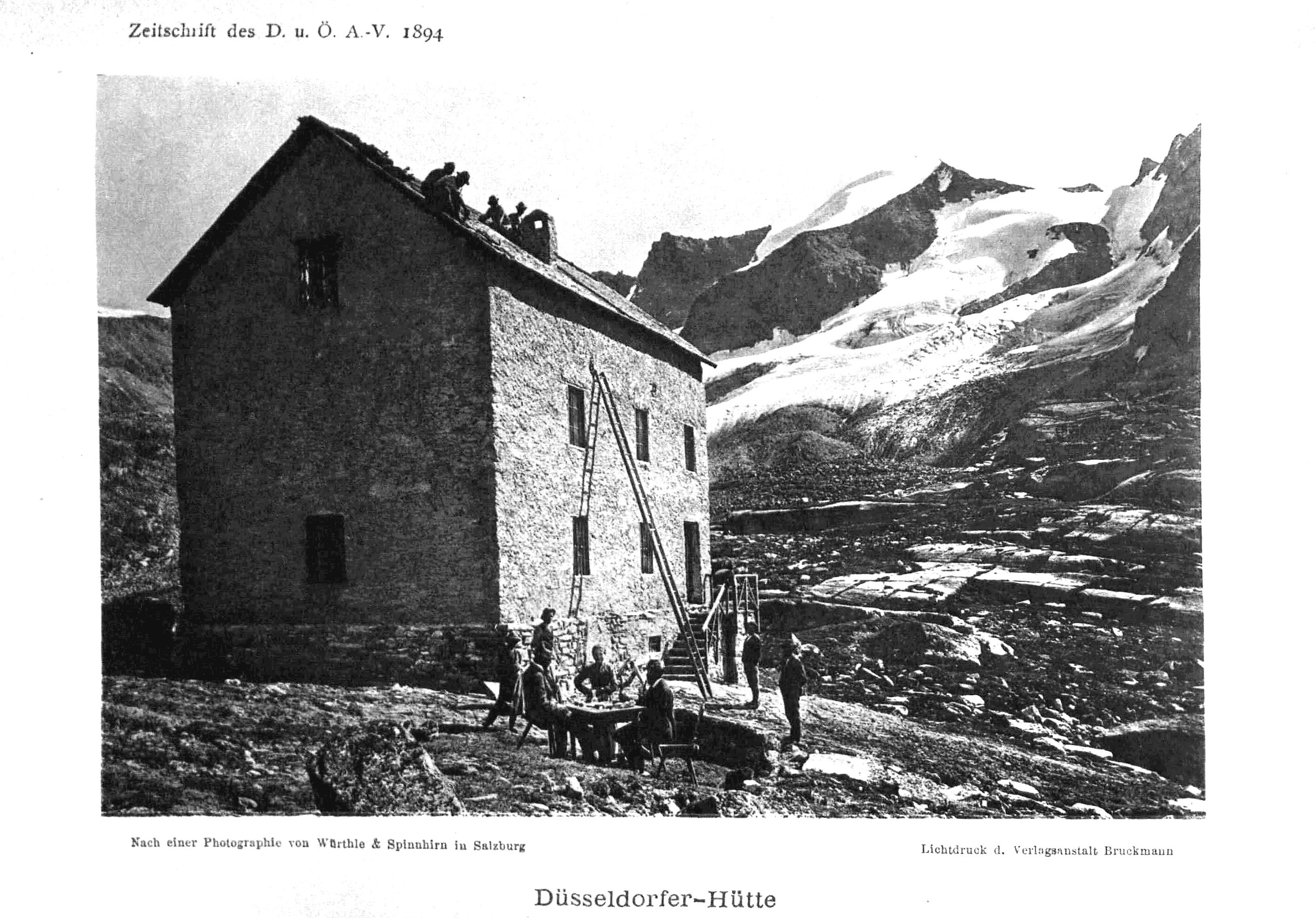 Düsseldorfer Hütte aus Zeitschrift des Deutschen und Oesterreichischen Alpenvereins 1894 Band 25